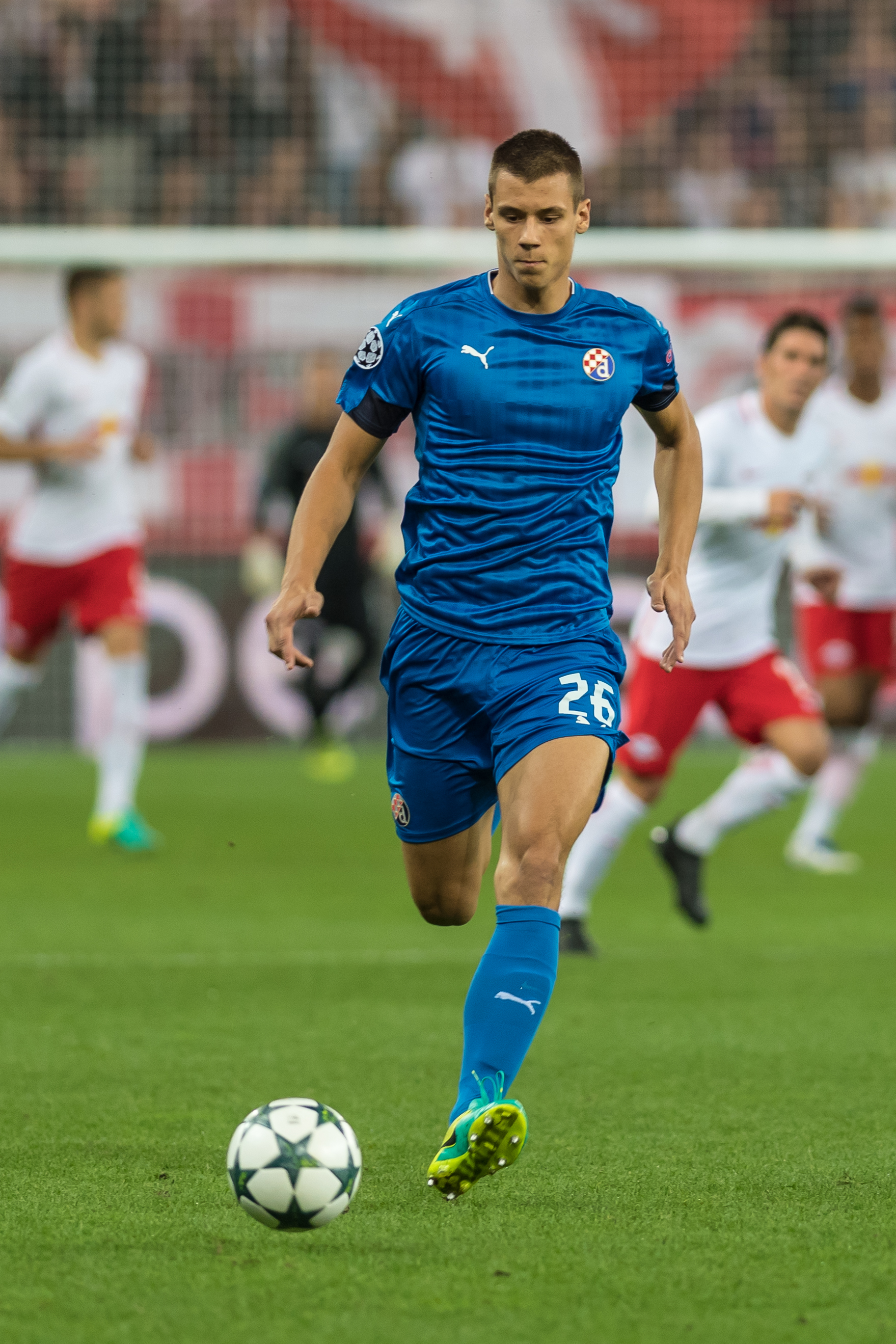 UEFA Champions League - Play-Offs - FC Salzburg vs Dinamo Zagreb. Bild zeigt Filip Benkovic (Dinamo Zagreb).